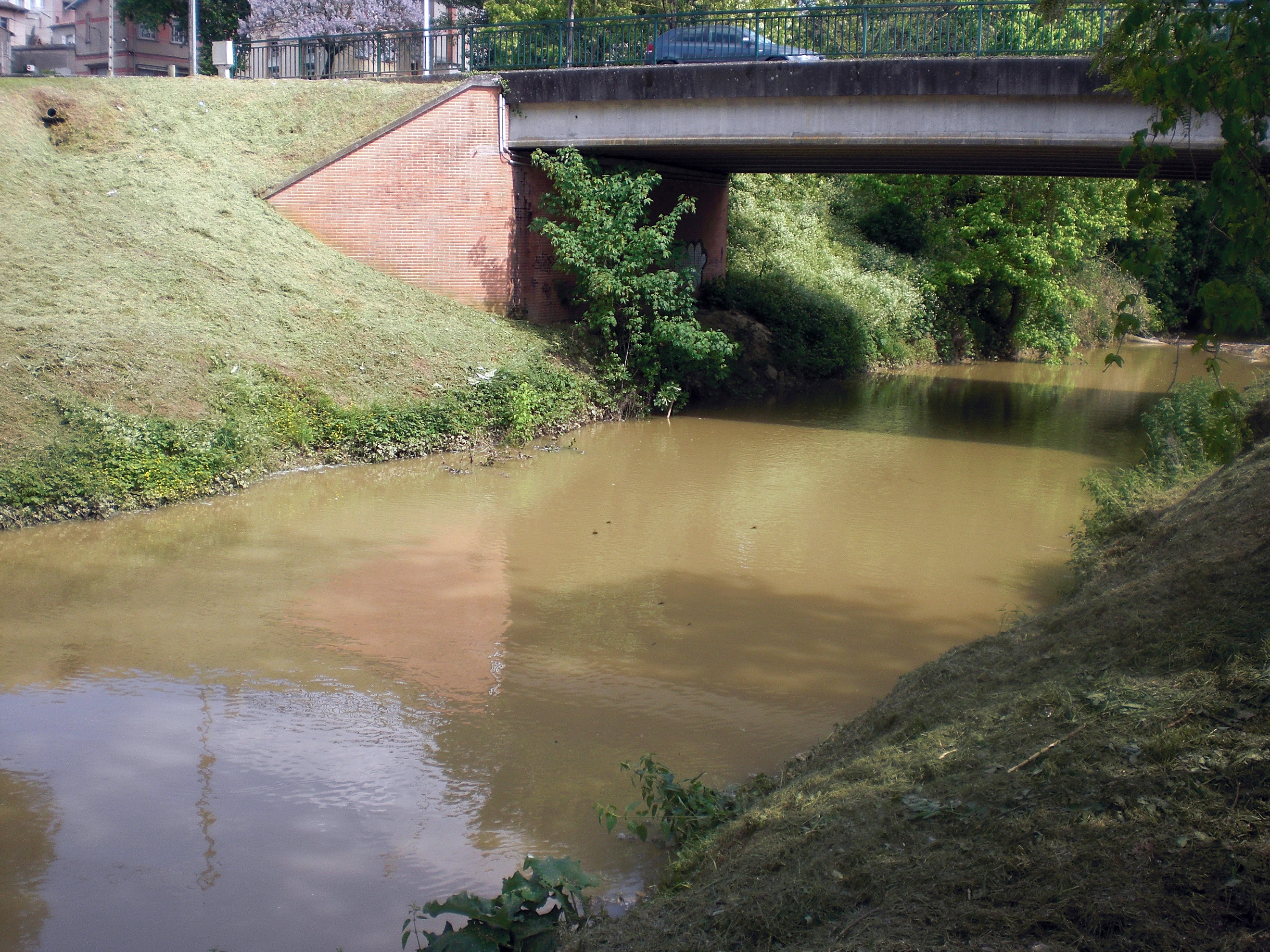 La rivière Tescou, quelques mètres avant son embouchure avec le Tarn, à Montauban (82)